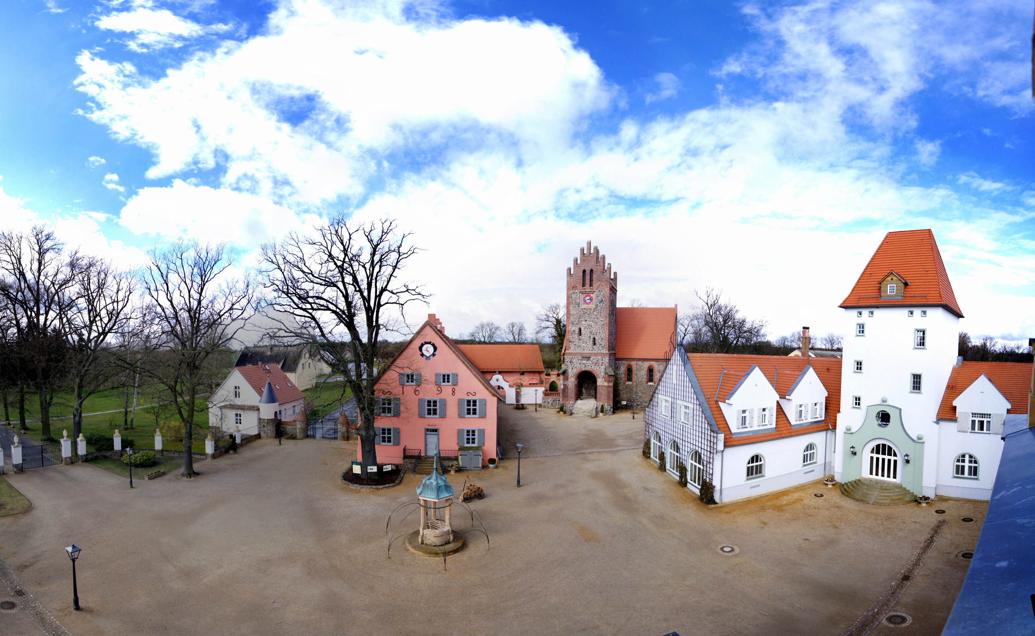 Blick vom Schloss Liebenberg auf den Schlosshof und die Kirche.